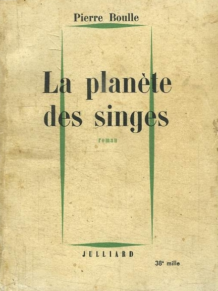 Couverture de La Planète des singes de Pierre Boulle